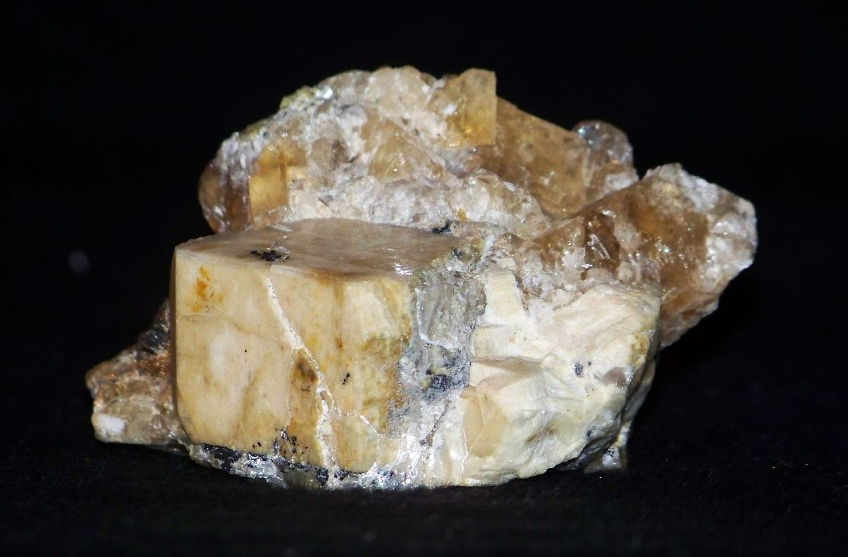 Mineralizacja pegmatytowa. Na zdjęciu widoczny kryształ ortoklazu, oraz kalcyt, klinochlor, fluoryt, zoisyt. kamieniołom Zimnik, okolice Jeleniej Góry, Dolny Sląsk.